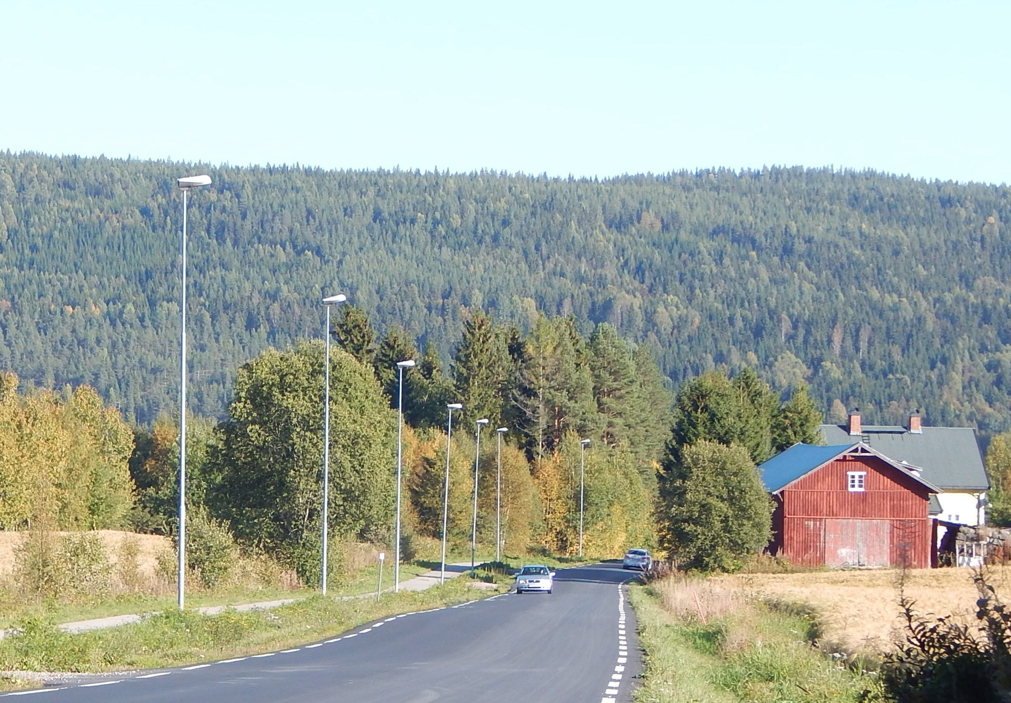 Åsbygdsveien (fylkesvei 601)